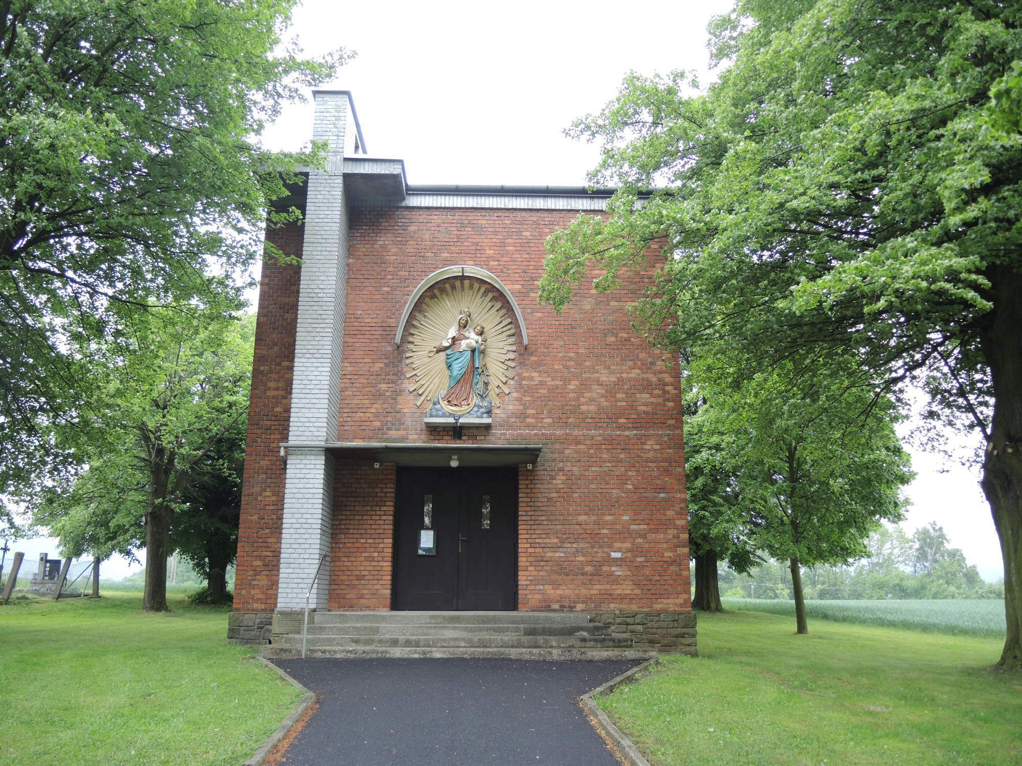 Kaple svatých Cyrila a Metoděje, Komárno (okres Kroměříž).